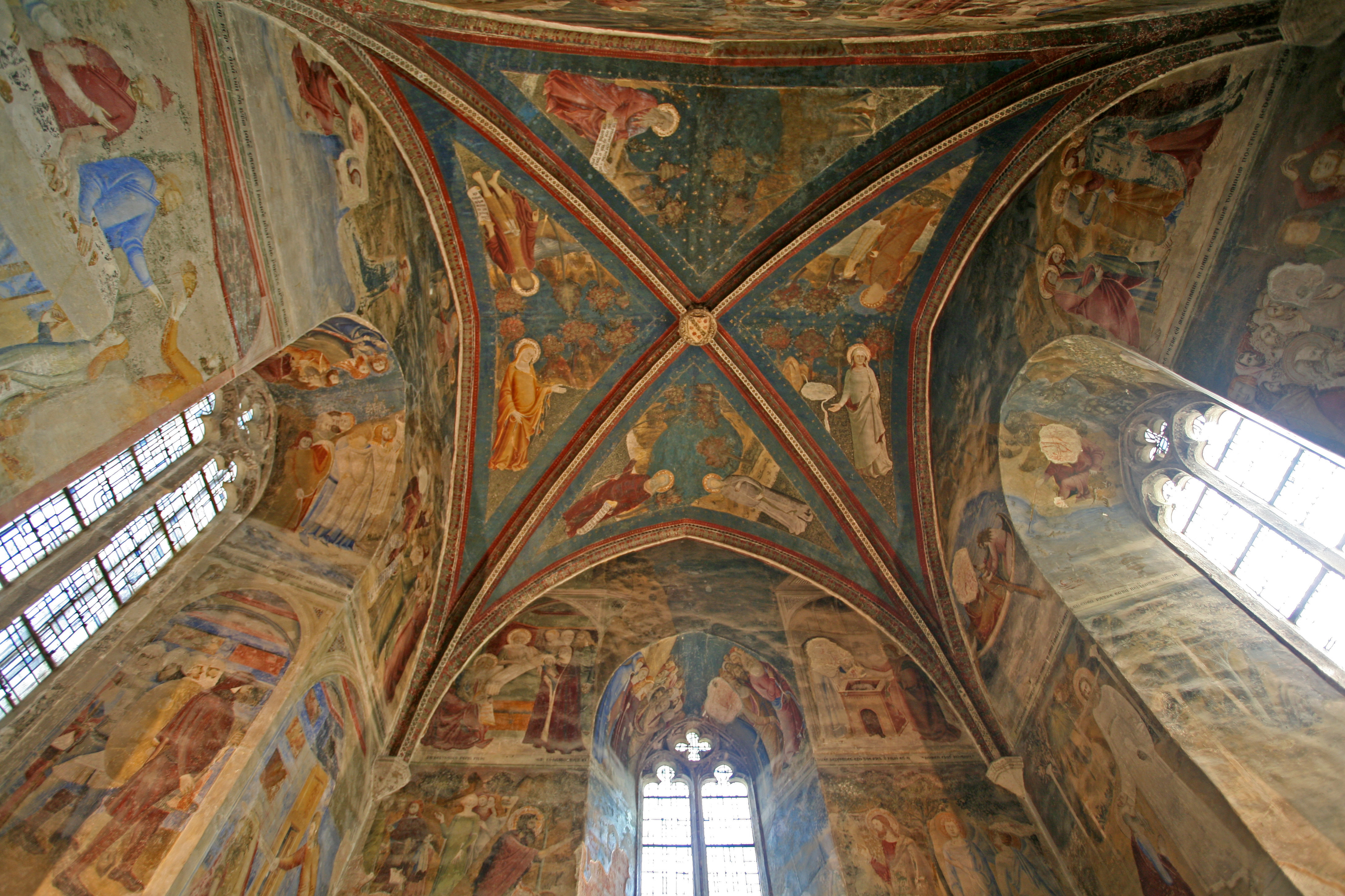 Plafond de la chapelle Saint-Jean (depuis le sol, à l'ouest), Palais des Papes, Avignon, Vaucluse, France